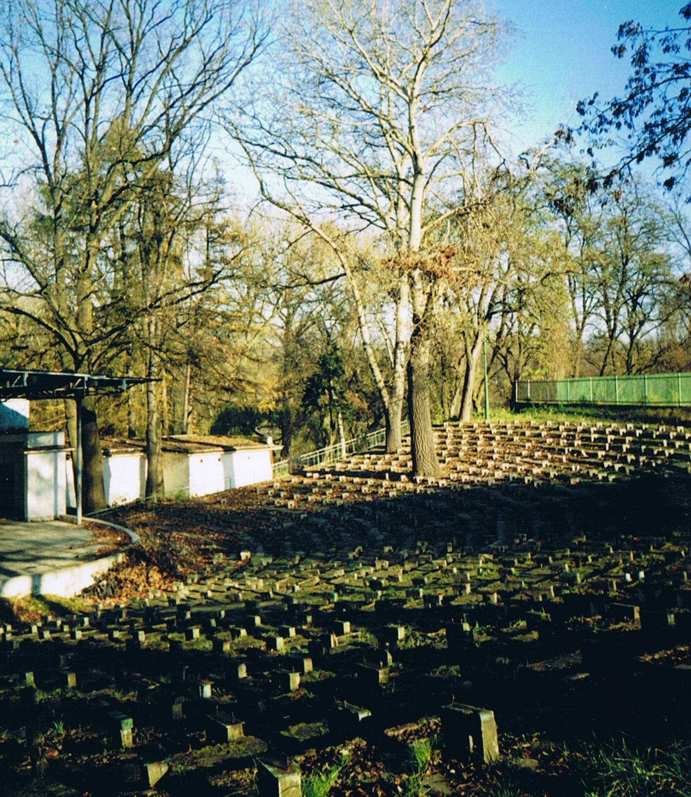 Amfiteatr we Włocławku, pierwsza połowa XXI wieku.